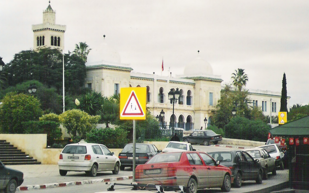 Photo du collège Sadiki